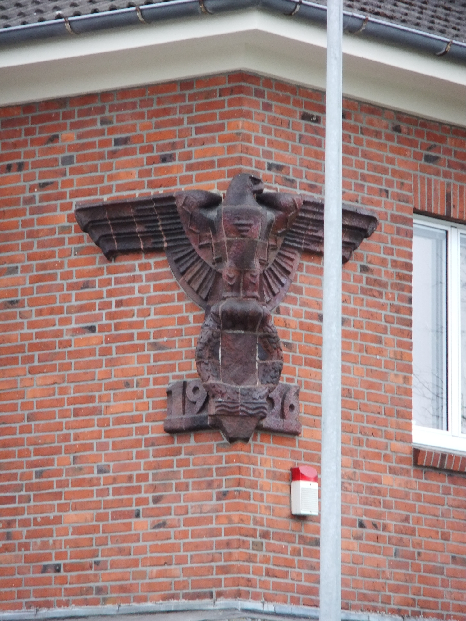 Zollamt Rotersand in Bremerhaven, Franziusstraße 1 .Das abgebildete Objekt ist ein geschütztes Kulturdenkmal in der Freien Hansestadt Bremen, mit der Nr. 3025 beim Landesamt für Denkmalpflege registriert.